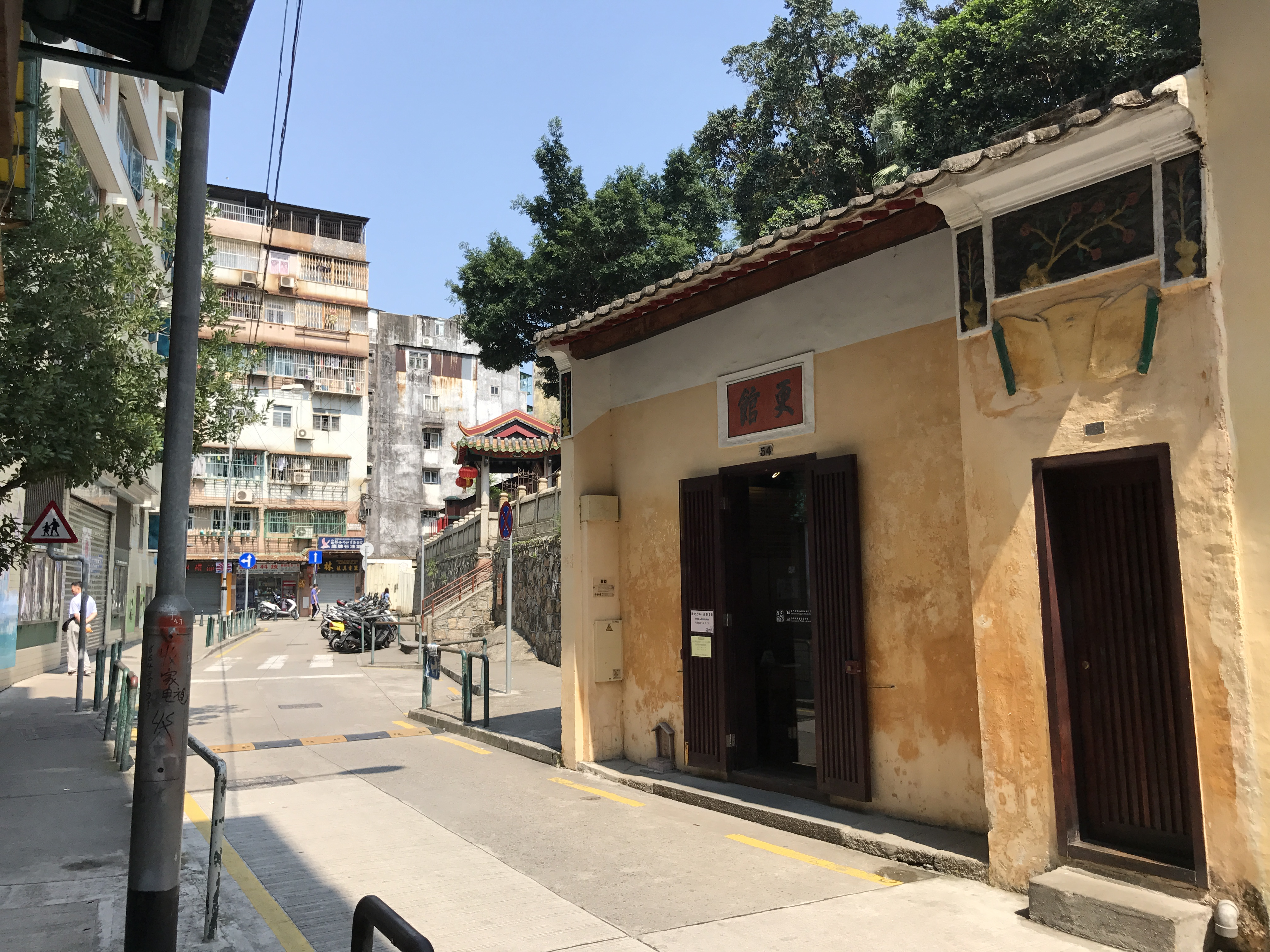 中文（台灣）: Posto do Guarda-Nocturno no Patane （沙梨頭更館）的正門位置